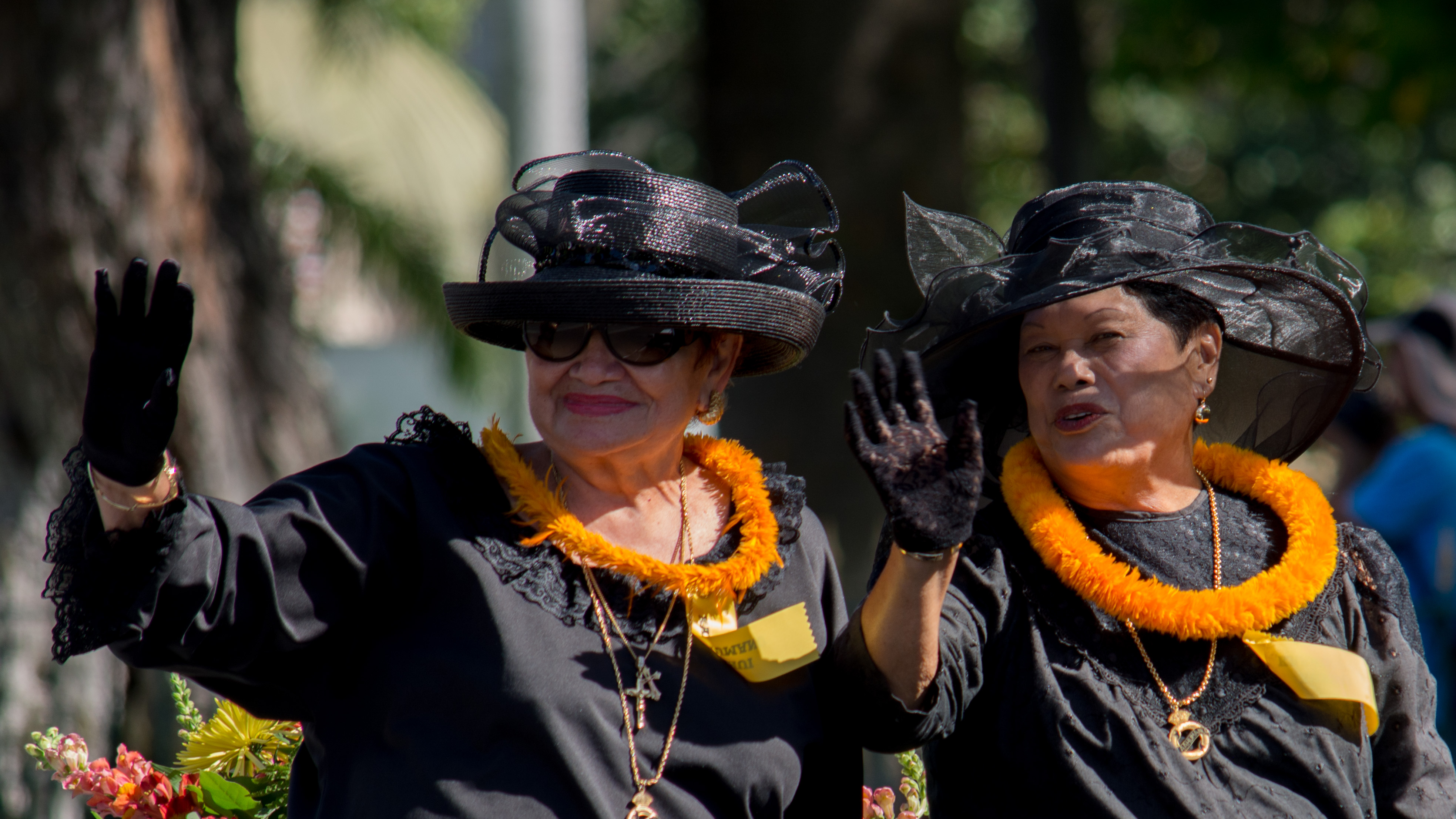 Staff from Ahahui Kaahumanu, 100th King Kamehameha Parade 2016